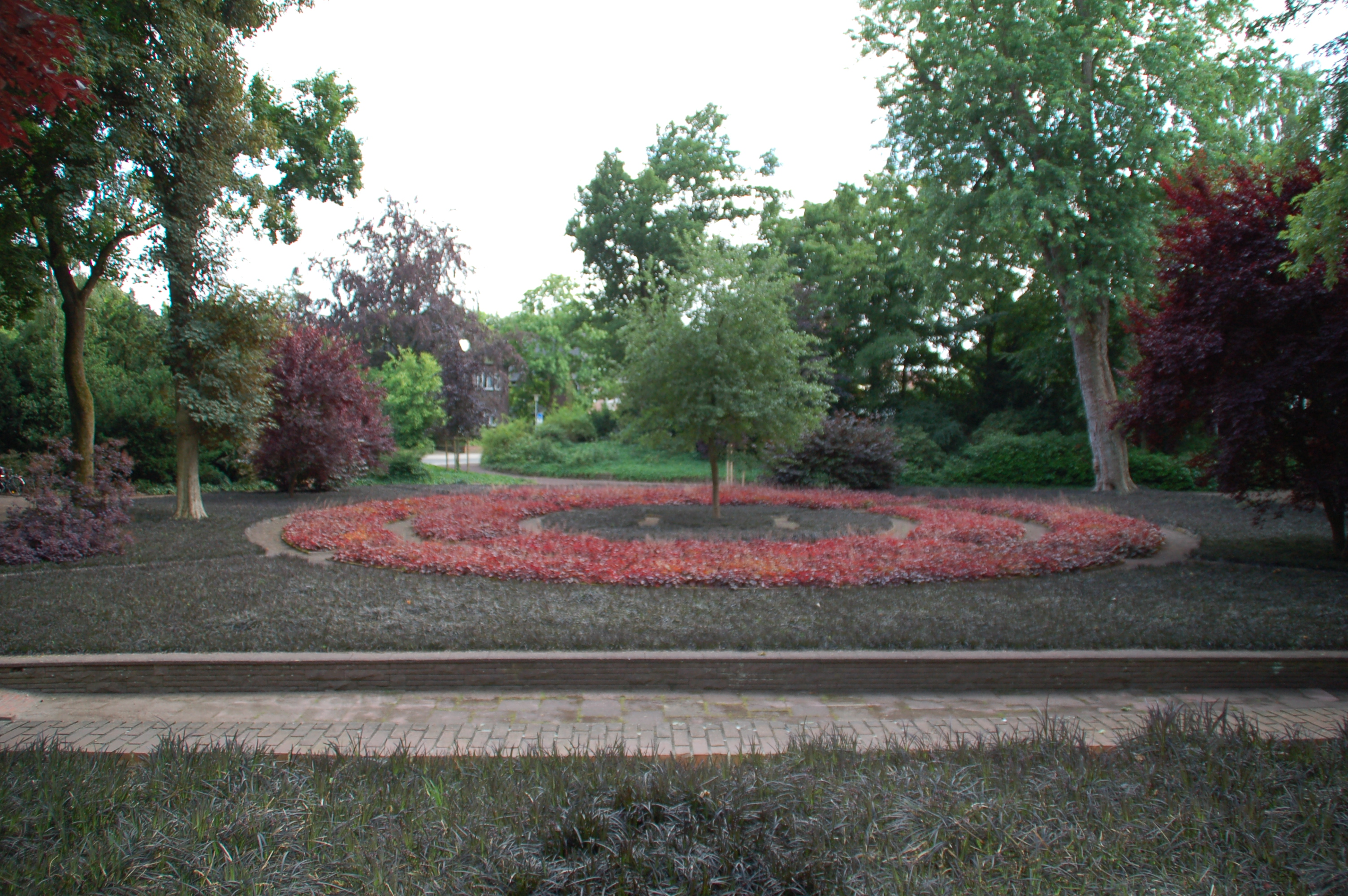 Schwarzer Garten in Nordhorn